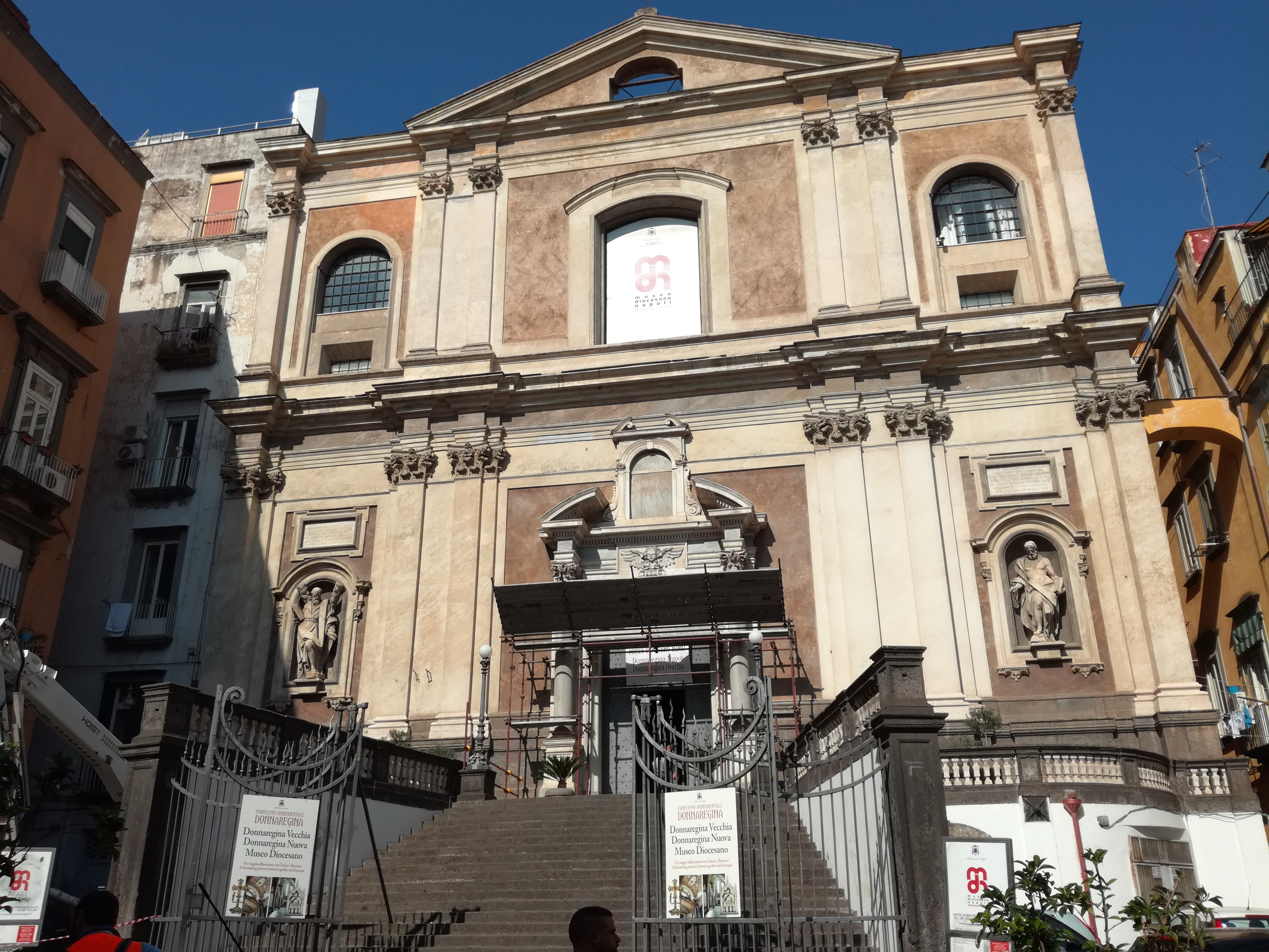 Facciata, Donnaregina Nuova, Napoli